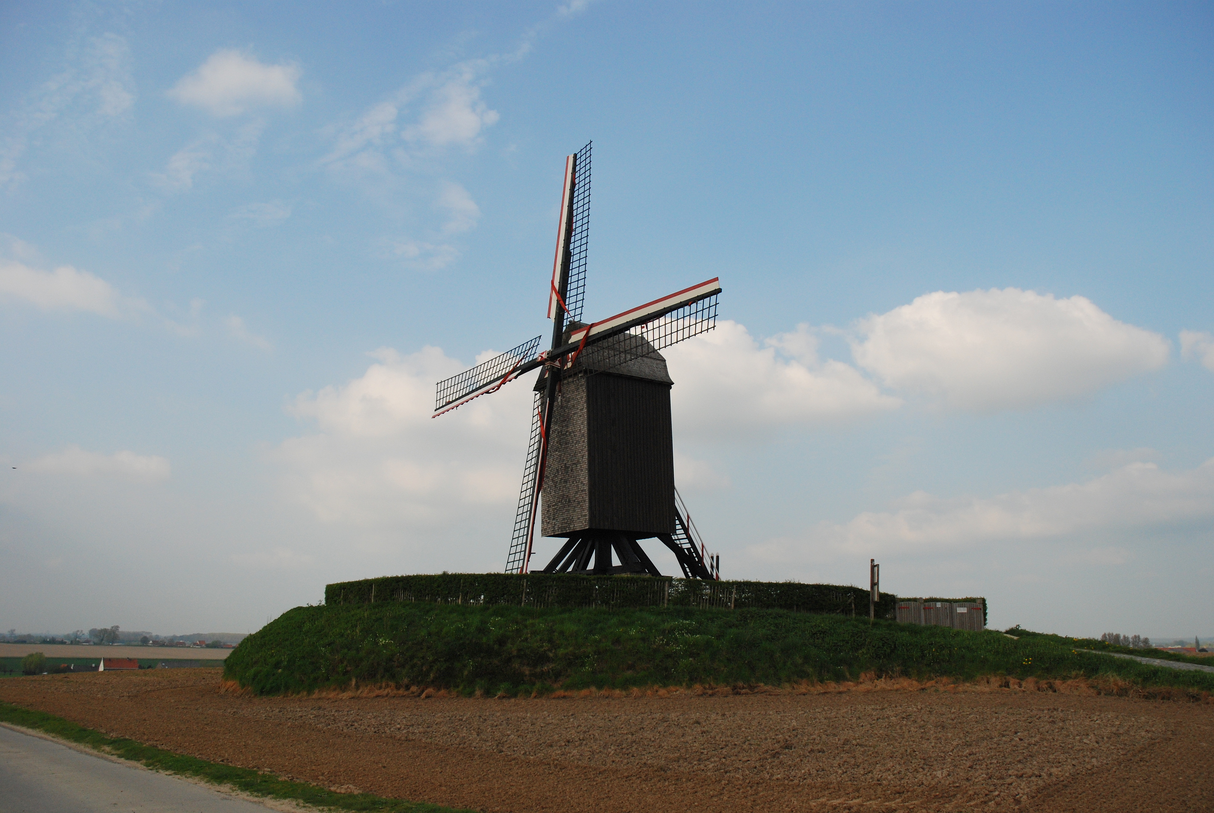 De Schietsjampettermolen in Wannegem-Lede (België)